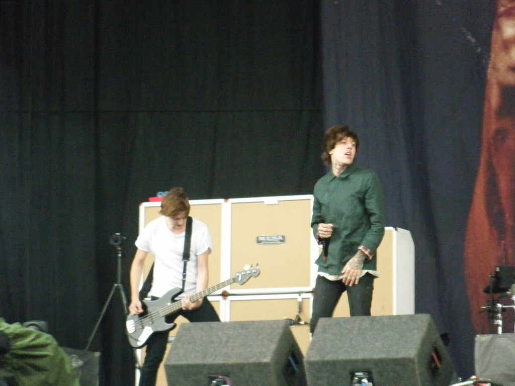 Reading Festival 2011